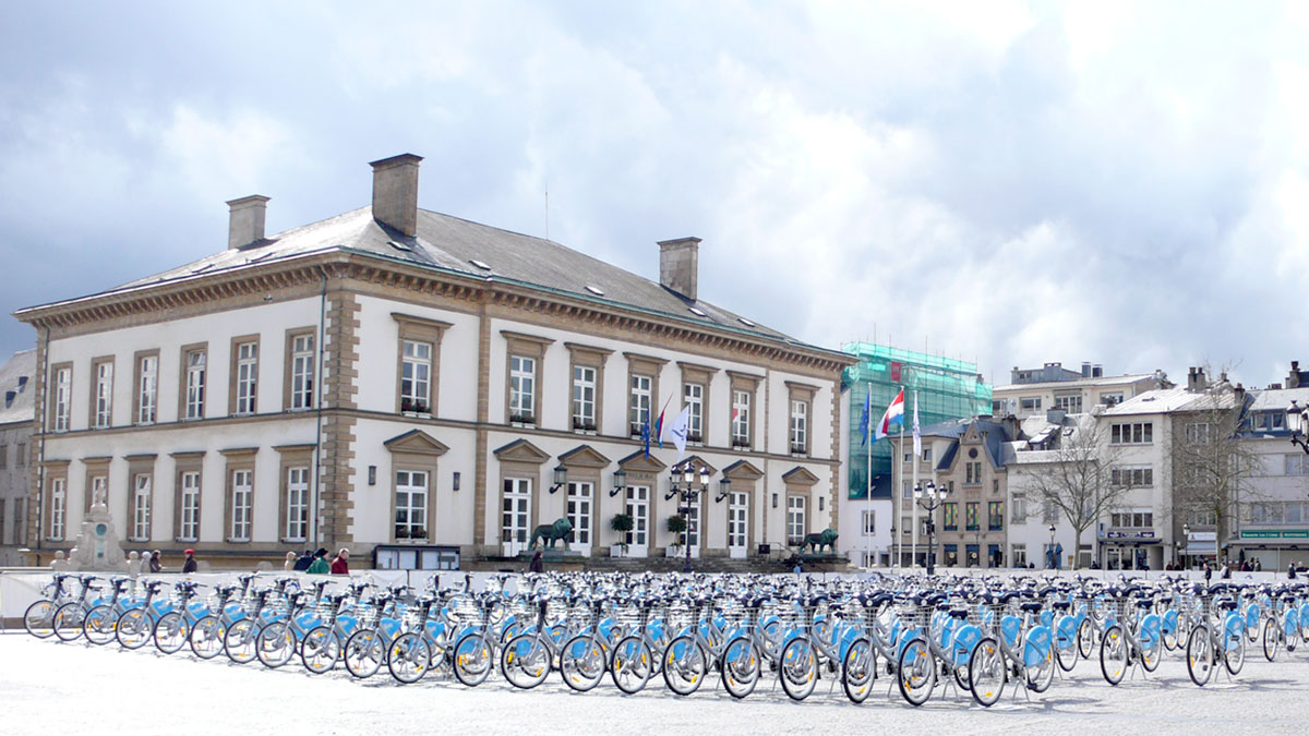 De vel'oH! gouf den 21. Mäerz 2008 um Knuedler lancéiert.